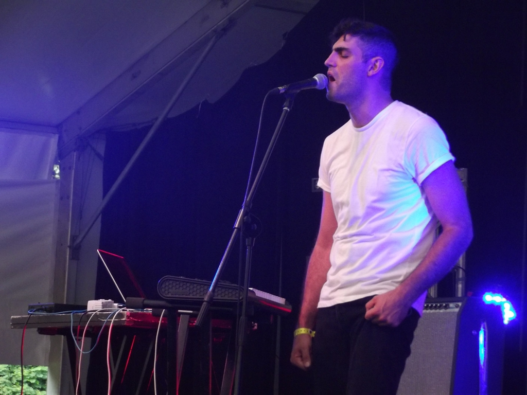 Daughn Gibson Zdjęcie zrobione podczas OFF Festival 2012 w Katowicach.